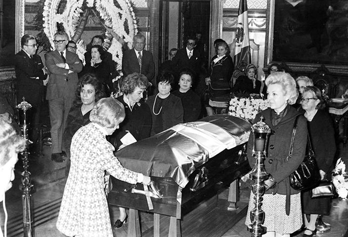 Fotografía antigua de la Ciudad de México resguardadas por el Museo Archivo de la Fotografía (MAF) de la Ciudad de México.